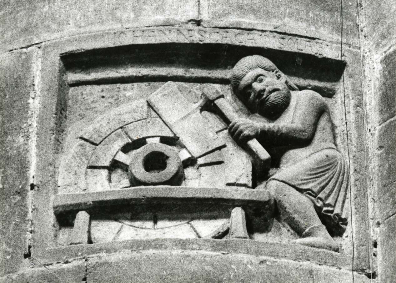 Servizio fotografico : Piacenza, 1965 / Paolo Monti. - Stampe: 3 : Positivo b/n, gelatina bromuro d'argento/ carta, 13x18. - ((Al verso delle stampe manoscritti i numeri dei negativi corrispondenti: 1915-6, 191/14. Sul coperchio della scatola, manoscritto a pennarello: "Archit. Antica". - Occasione: Pubblicazione: "Emilio CECCHI, Natalino SAPEGNO (a cura di), Storia della Letteratura Italiana, 9 voll., Milano, Garzanti, 1966 e segg."